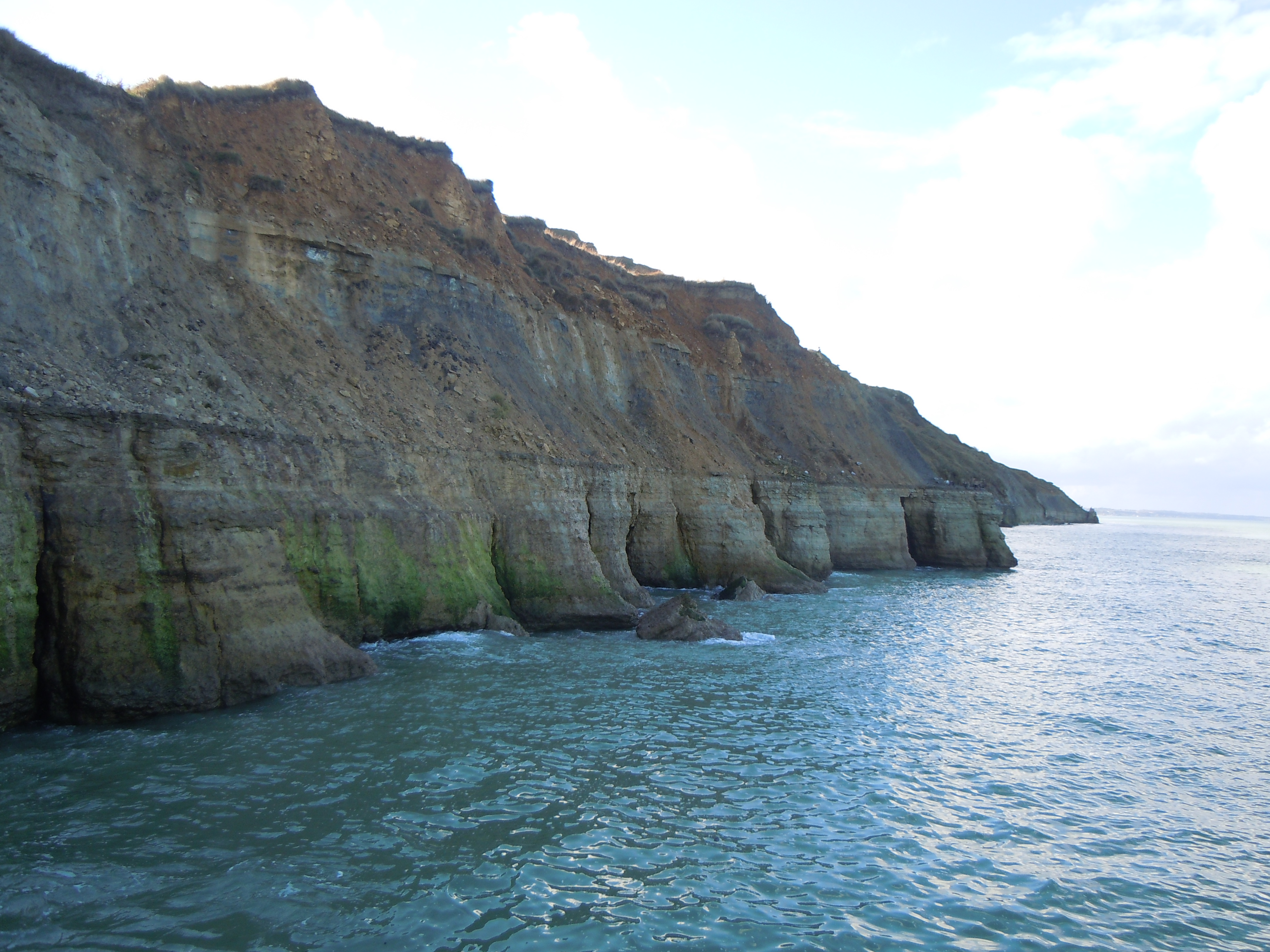 Falaises marneuses à l'ouest de Port en Bessin à marée haute. (coefficent 80)